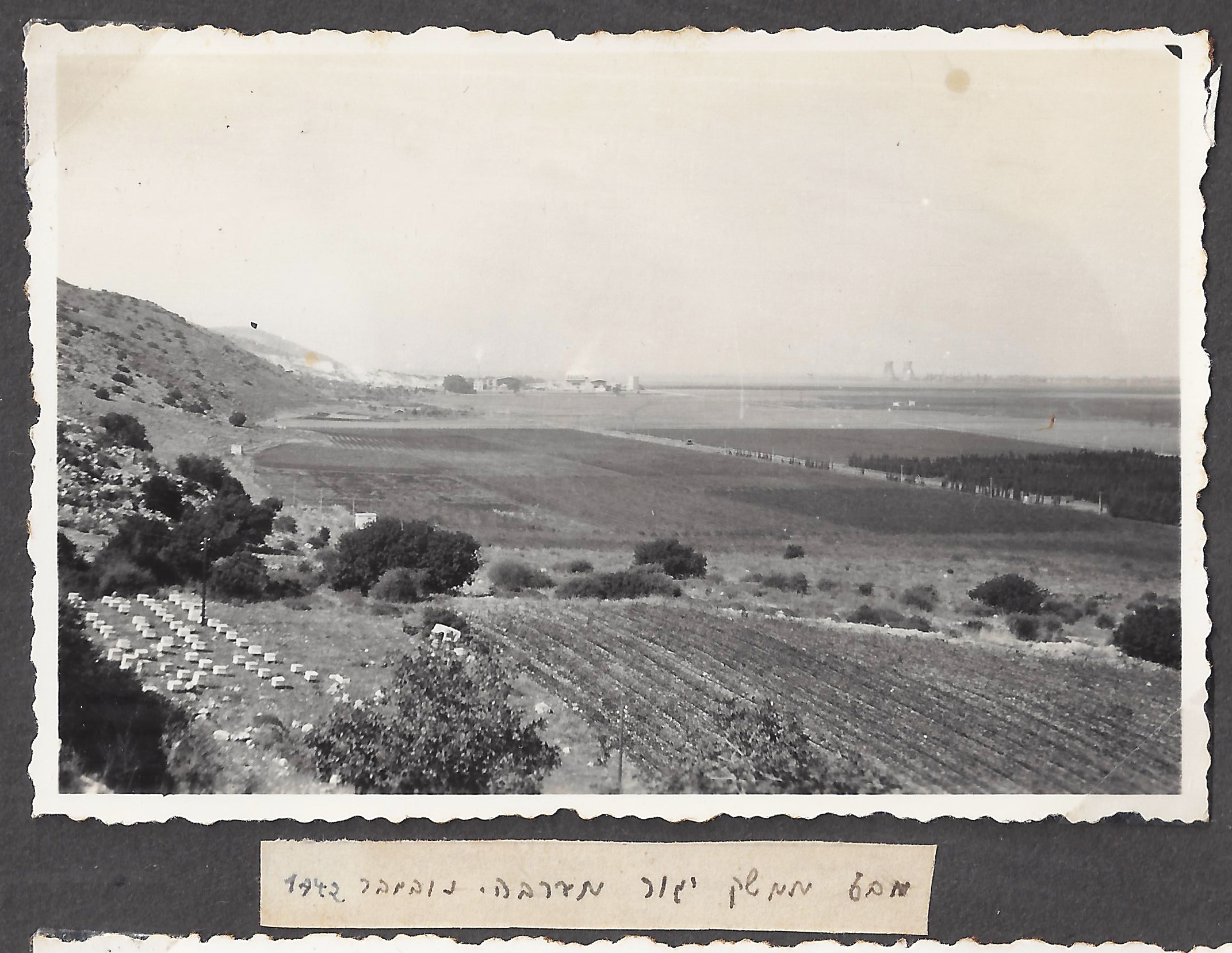 בצידה הימני של התמונה ניתן לראות את הלבניות של בתי הזיקוק